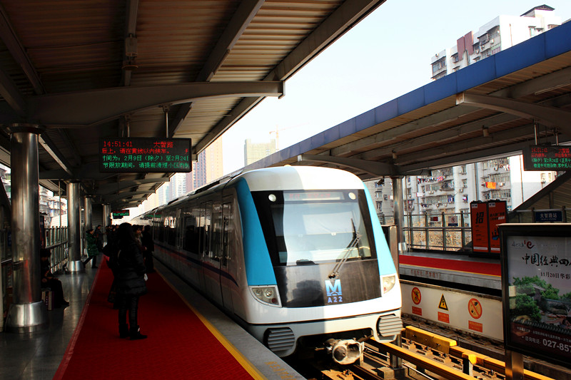 中文（中国大陆）: 武汉地铁1号线